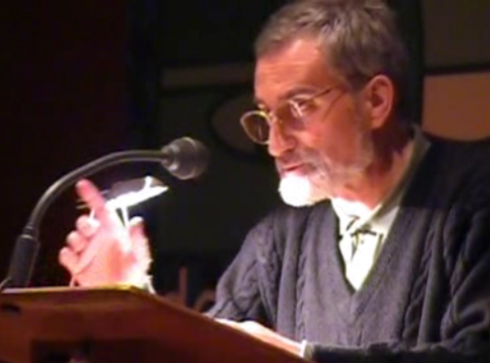 Xabier Lete abeslari eta poeta 2008an, hitzaldi bat ematen Iruñean.